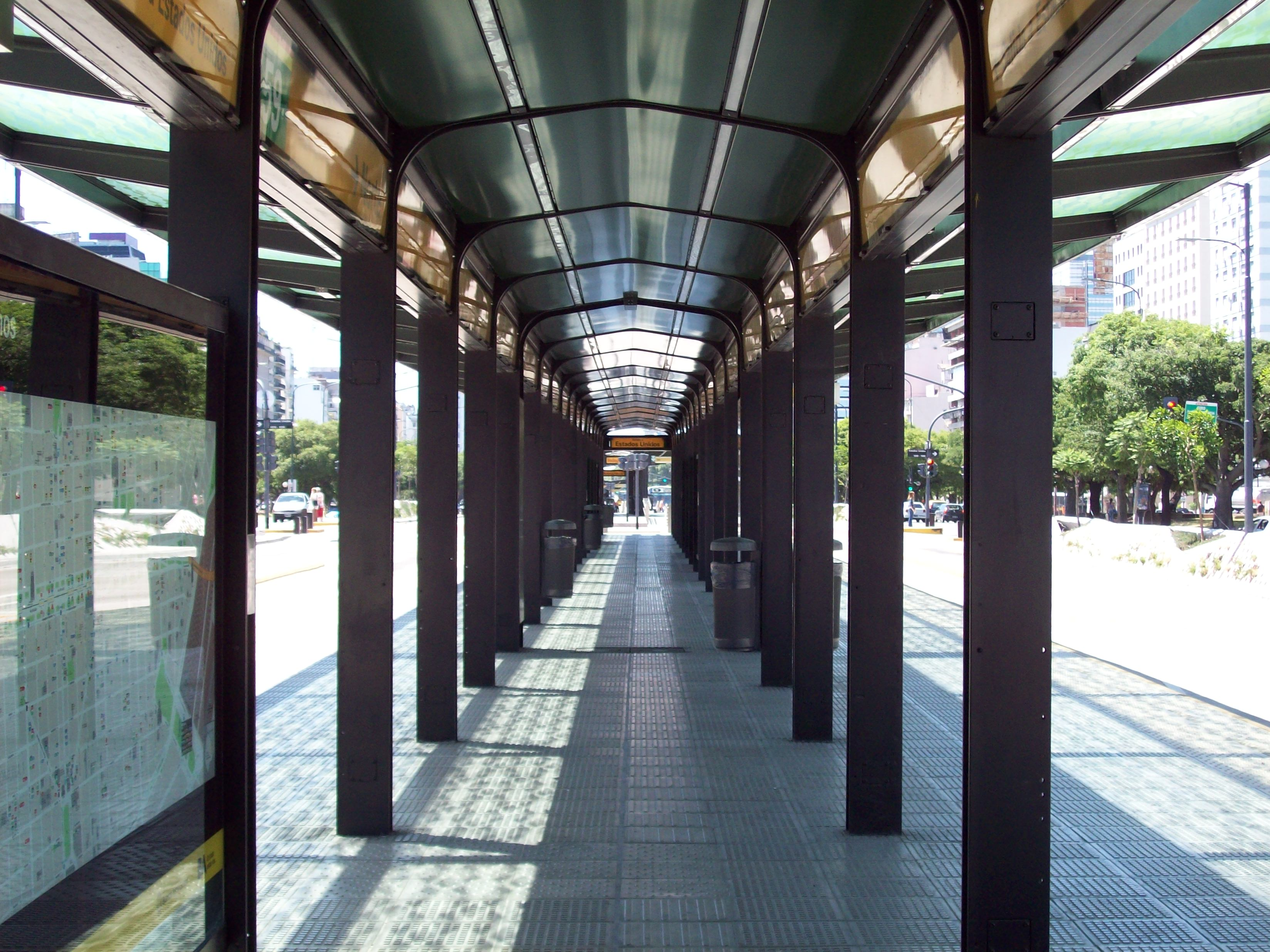 Metrobus 9 de Julio, Ciudad de Buenos Aires, interior.